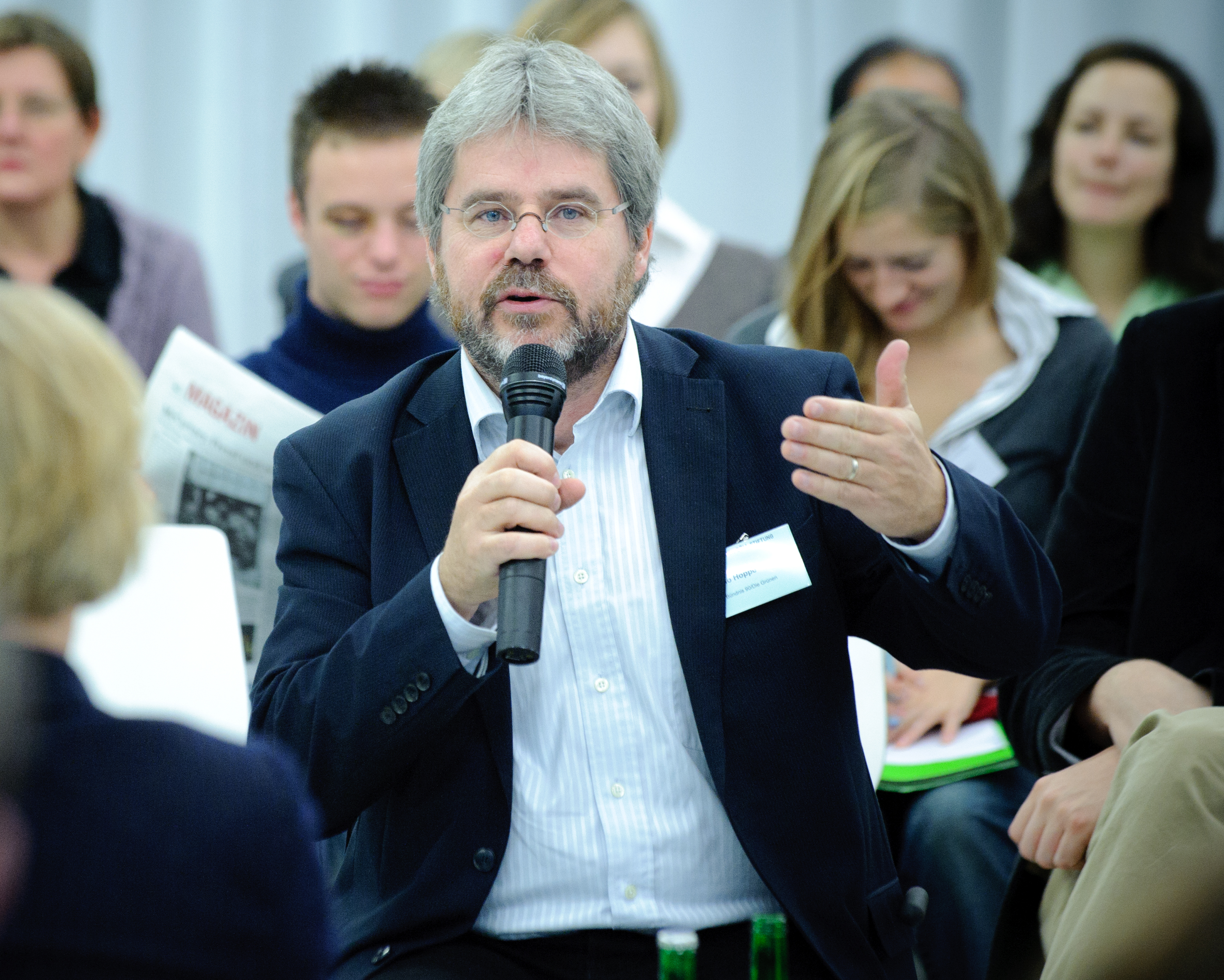 Bild: Stephan Röhl